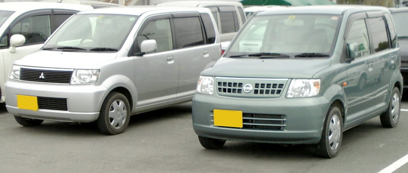 初代eKワゴン&オッティ。投稿者撮影。 Category:軽自動車画像